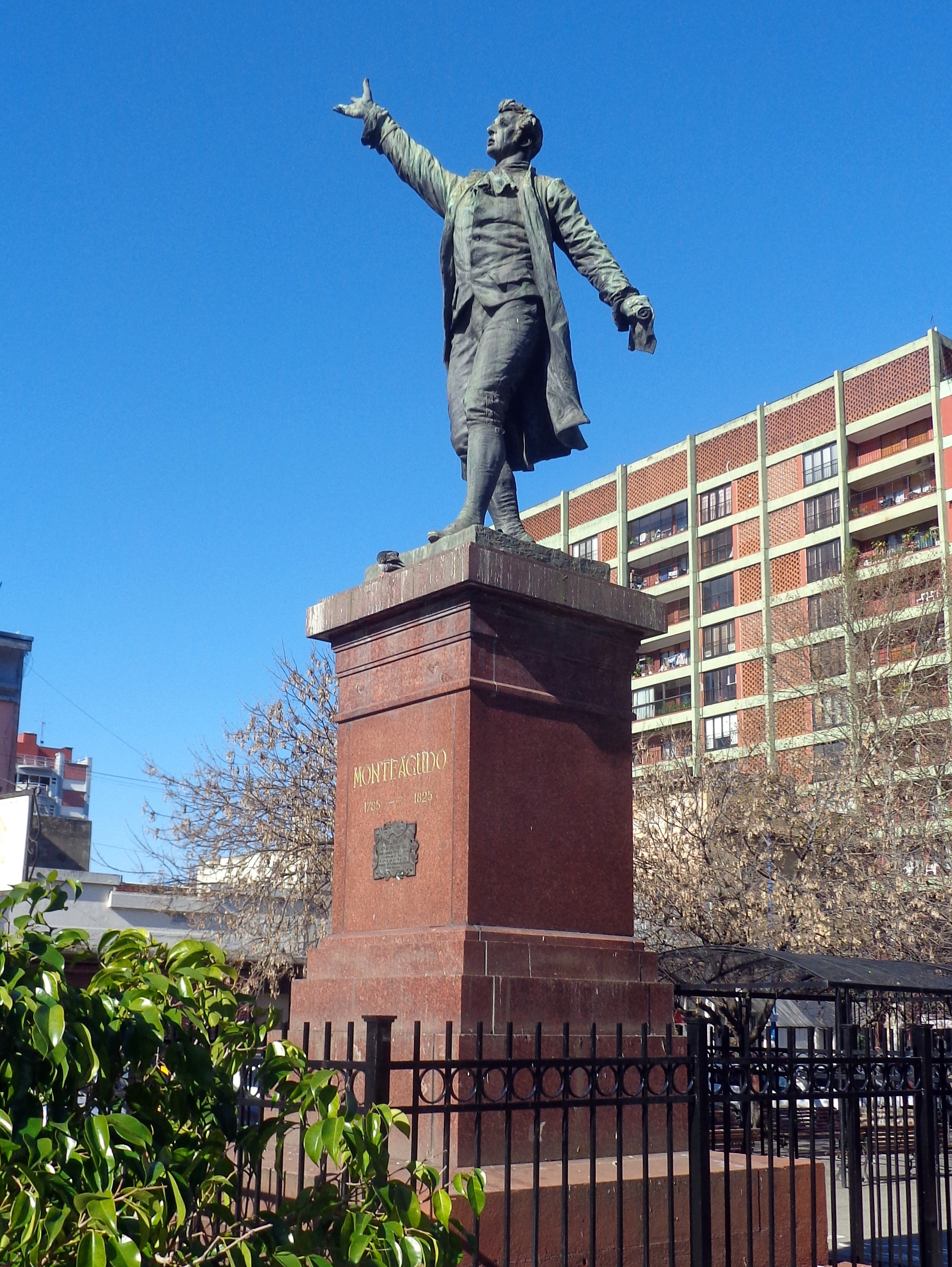 Monumento a Monteagudo, obra del alemán Gustavo Eberlein, en Av Caseros y Monteagudo, Parque Patricios, Buenos Aires.